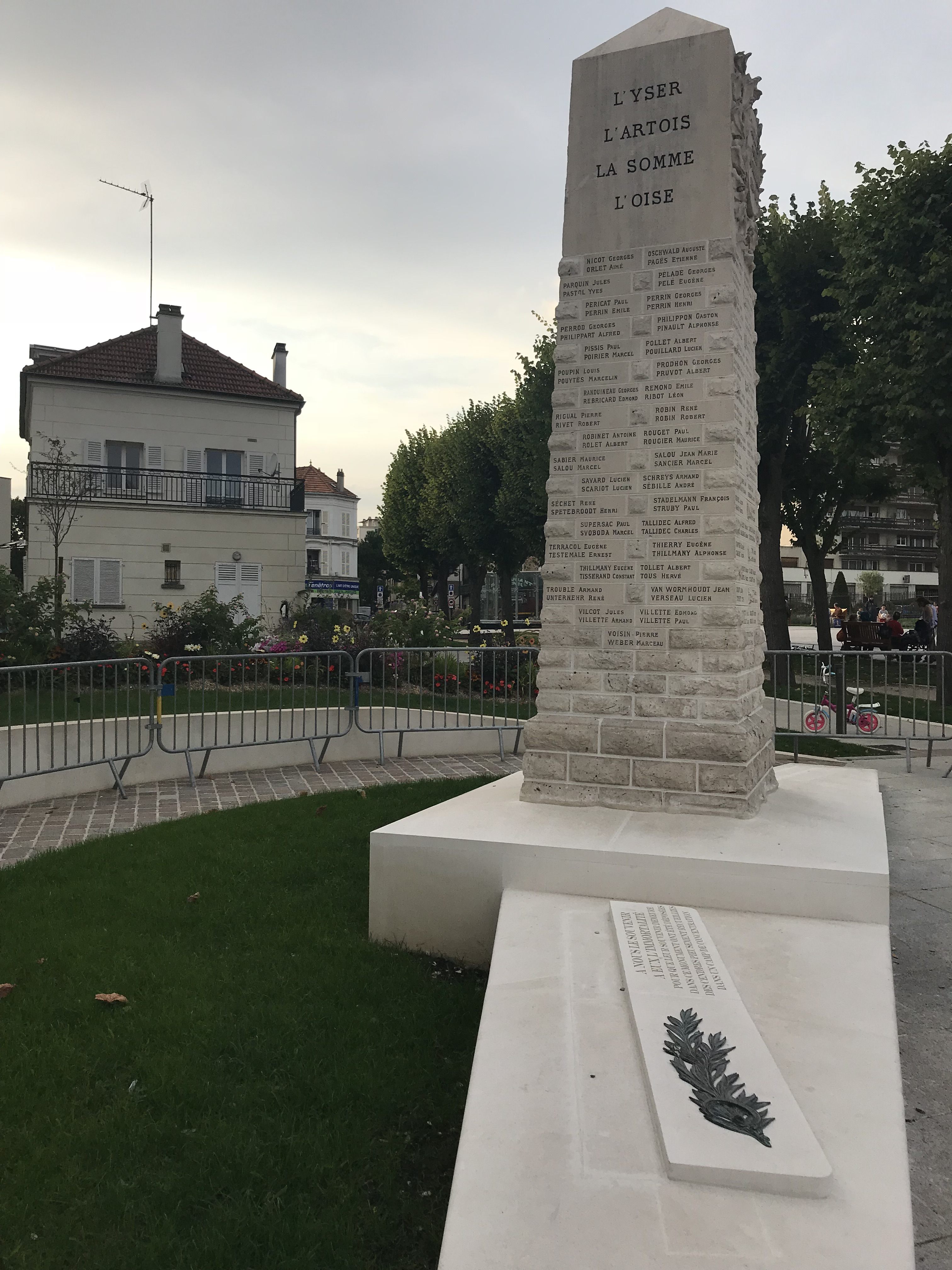 Le monument aux morts et la stèle sous laquelle reposent les cendre de déportés prélevées dans les camps de la mort.